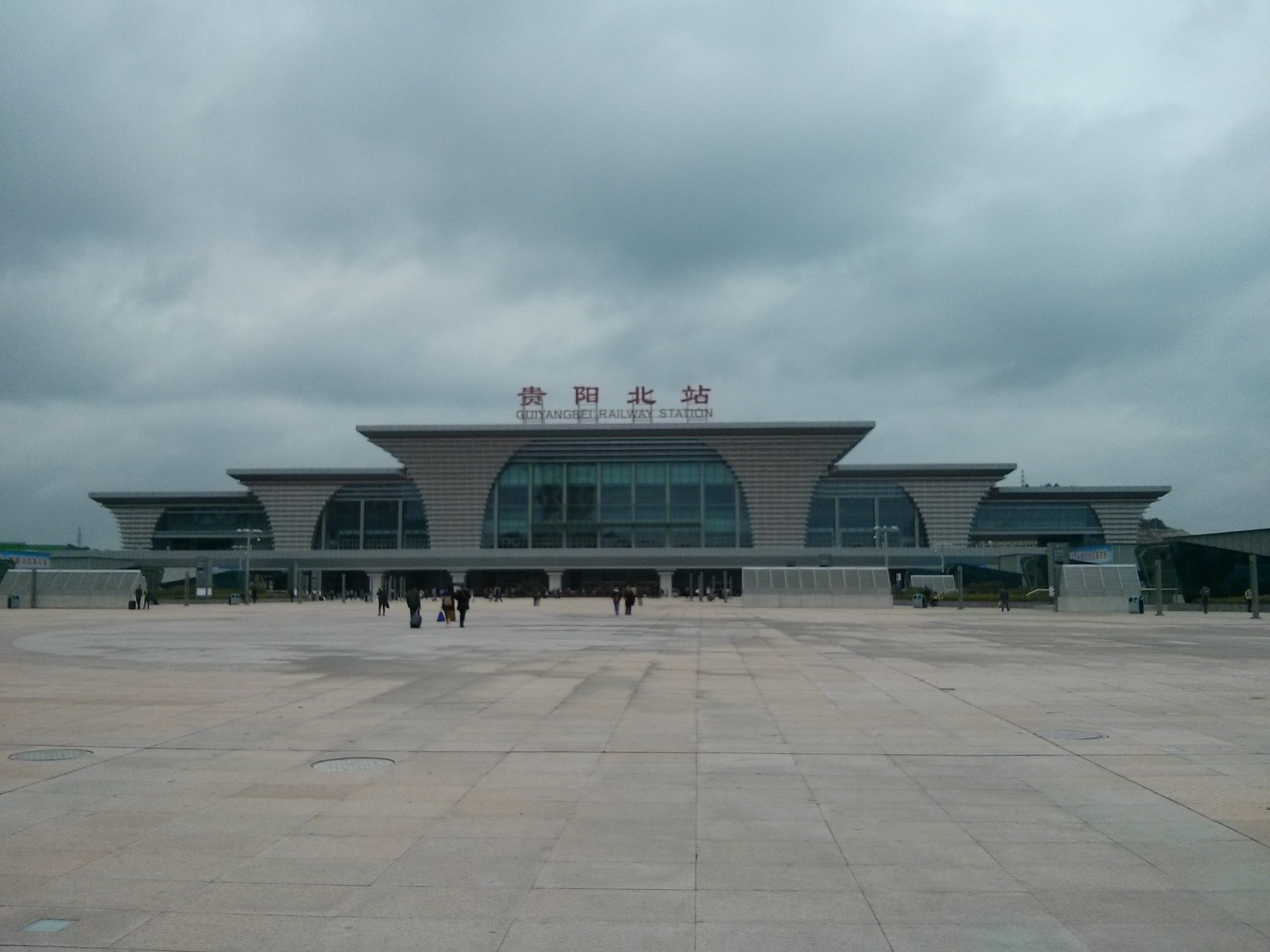 贵州省贵阳北站